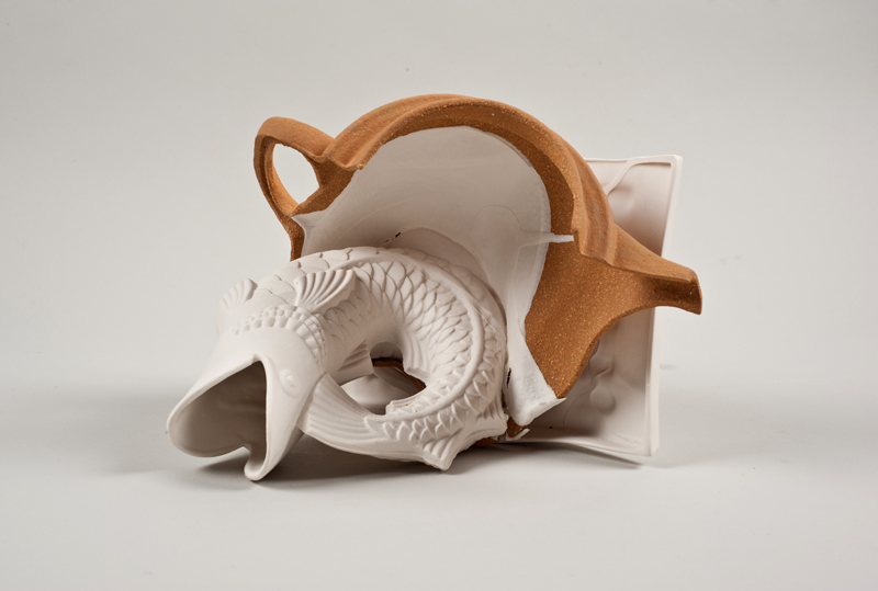 מתוך הפרויקט אזל. חומר קרמי מקומי בשילוב עם פורצלן